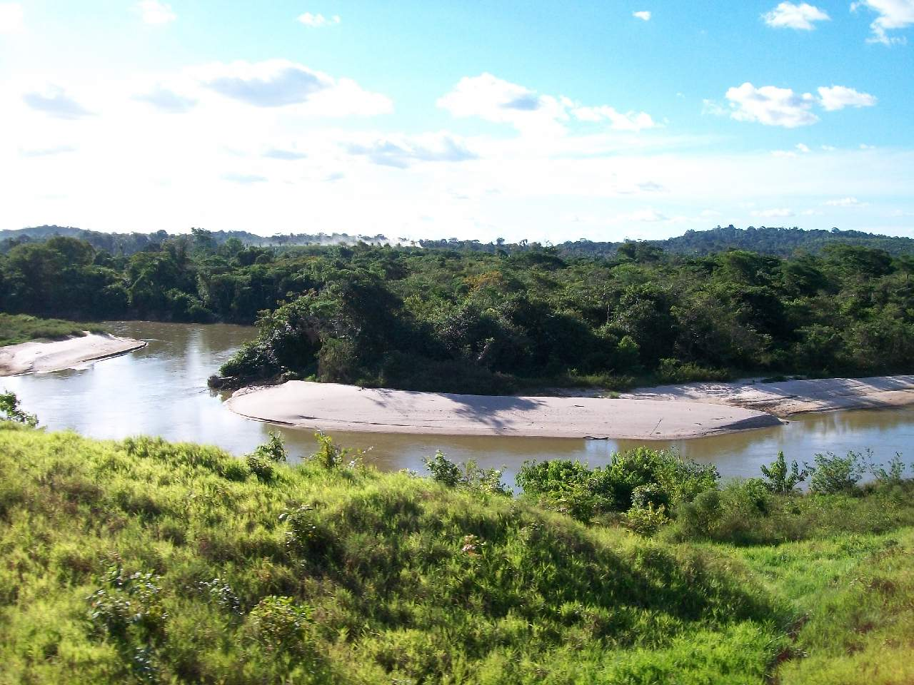 Rio Pindaré, e seu devastador assoreamento.